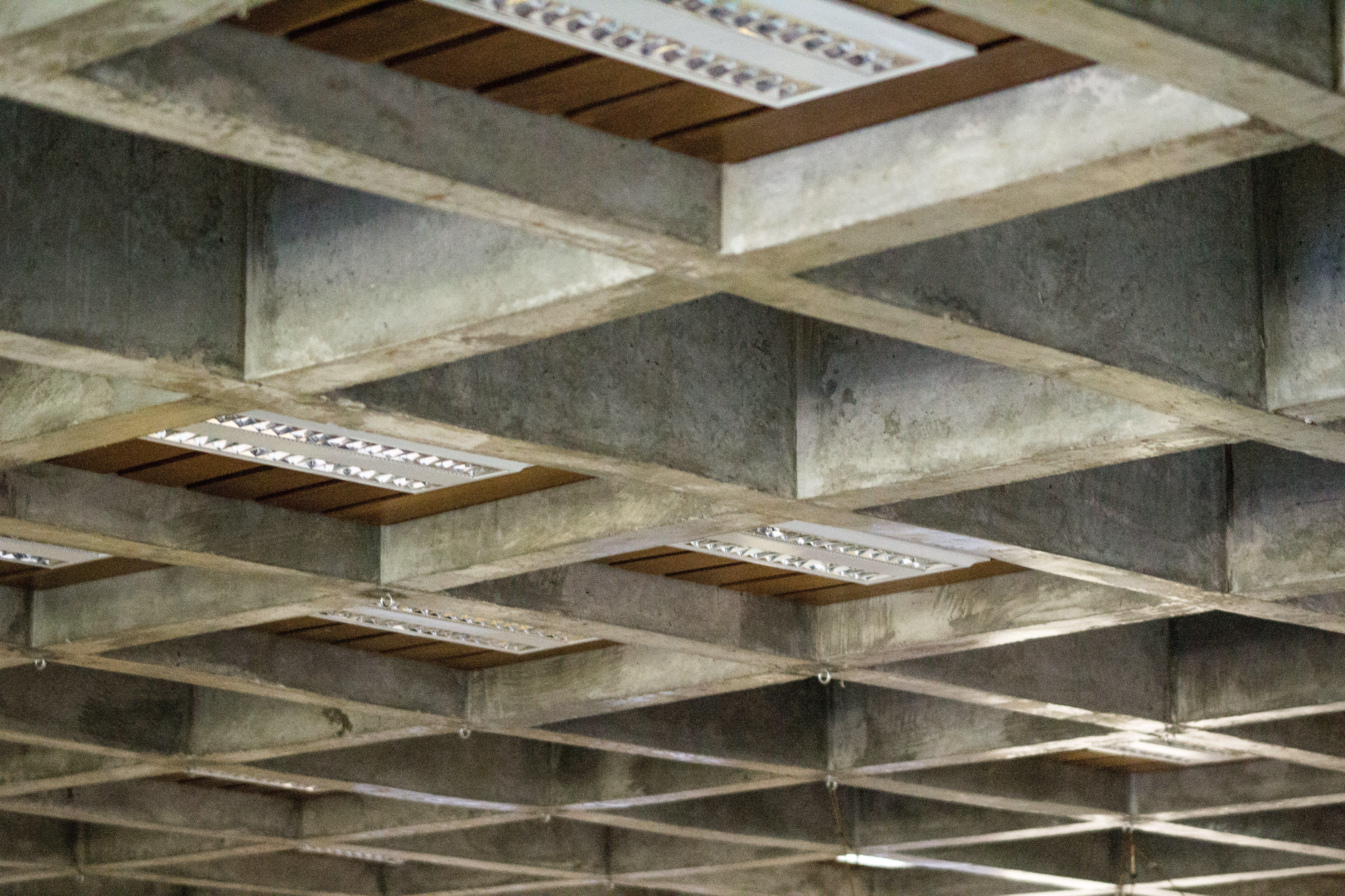 Faculdade de Arquitetura e Urbanismo da Universidade Federal do Pará.